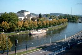 Saarbrucken2 on 08 10 2005